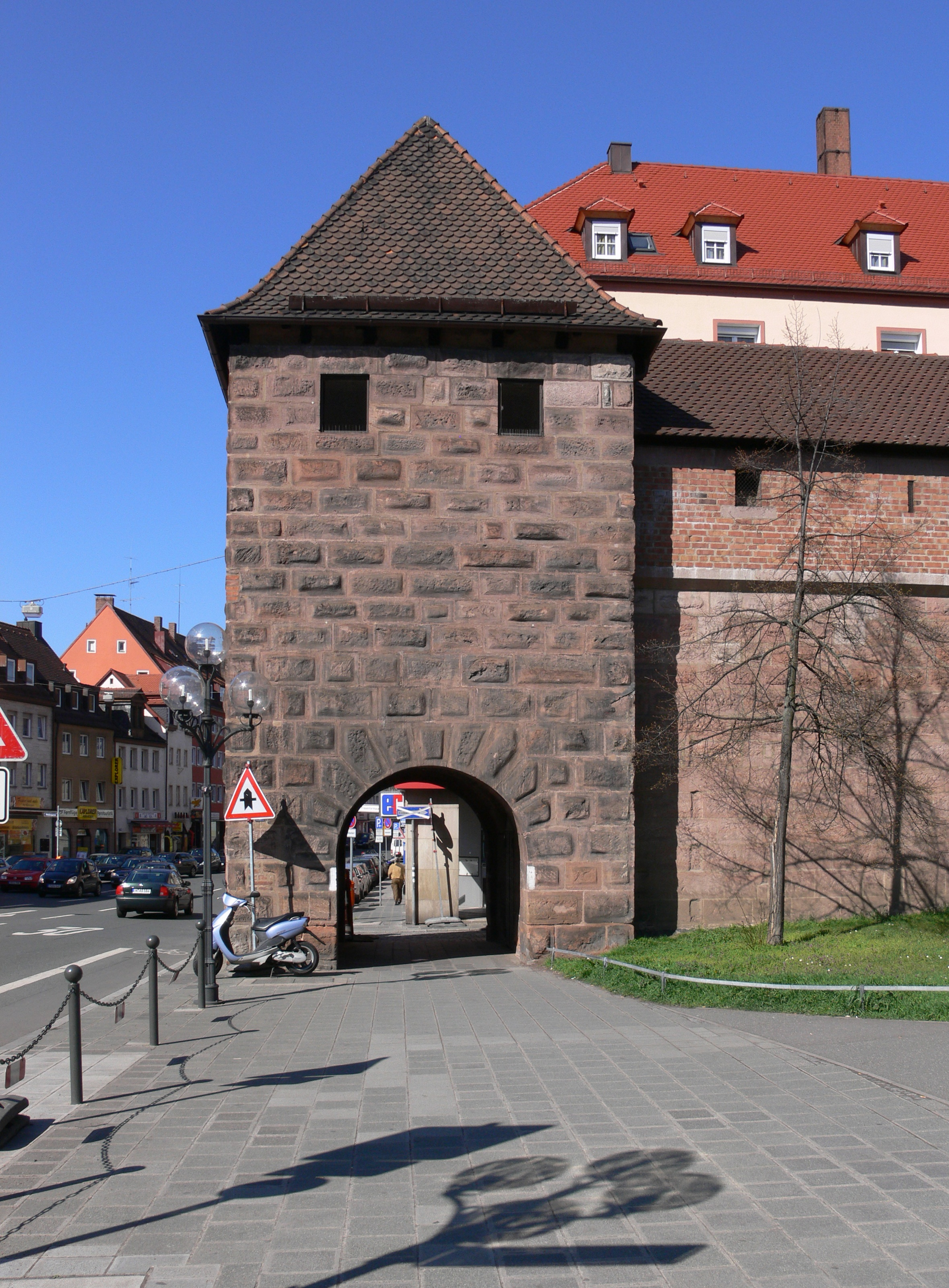 Nürnberg, Frauentormauer Turm Rotes H am Färbertor (Teil des Bunkers zwischen Turm Rotes H und Rotes G), Feldseite